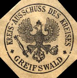 Sealing stamp Title: Kreis - Ausschuss des Kreises - Greifswald Description: grau, schwarz Place: Greifswald size: 3 cm